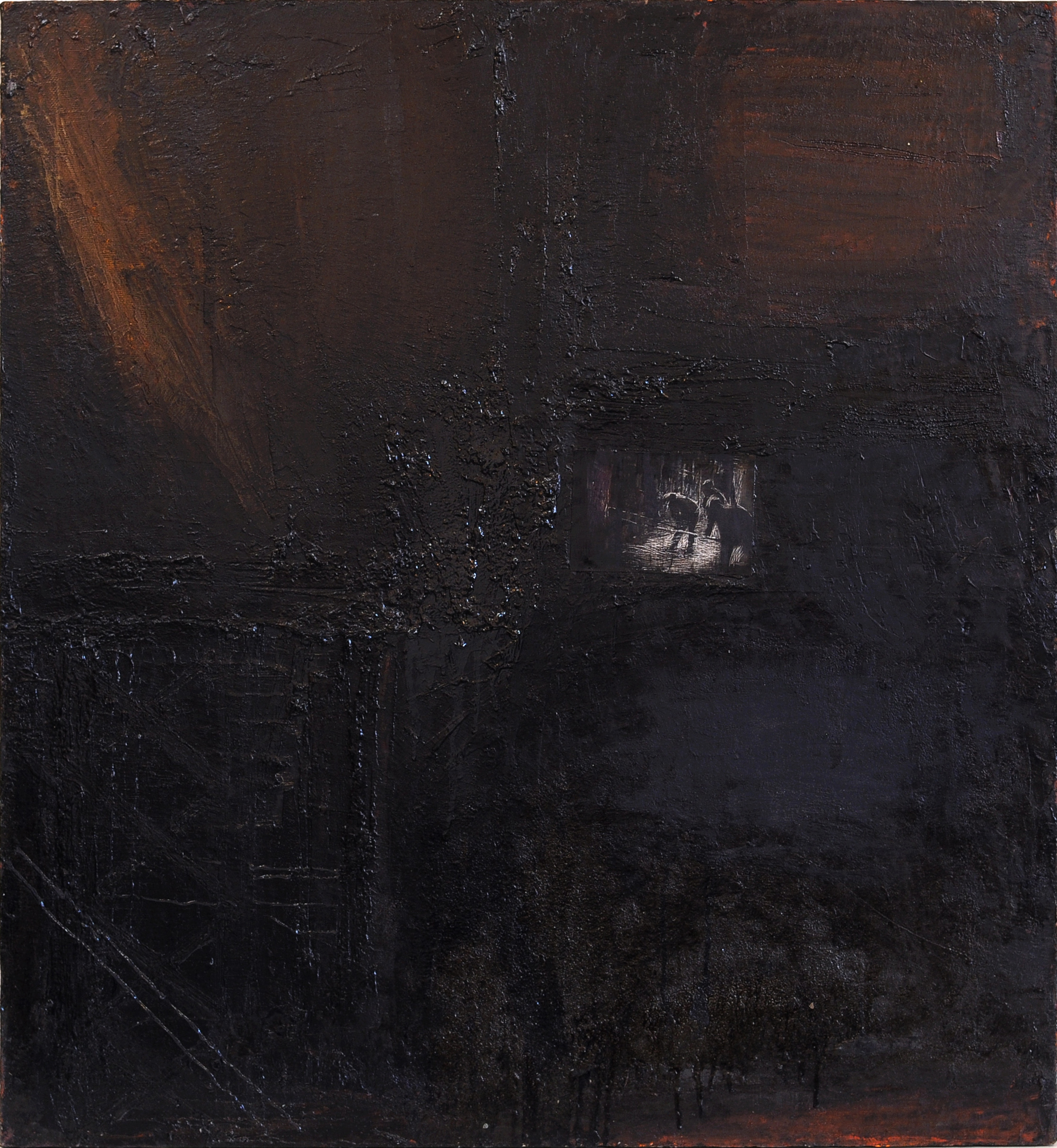 2009, холст, масло, 112х103